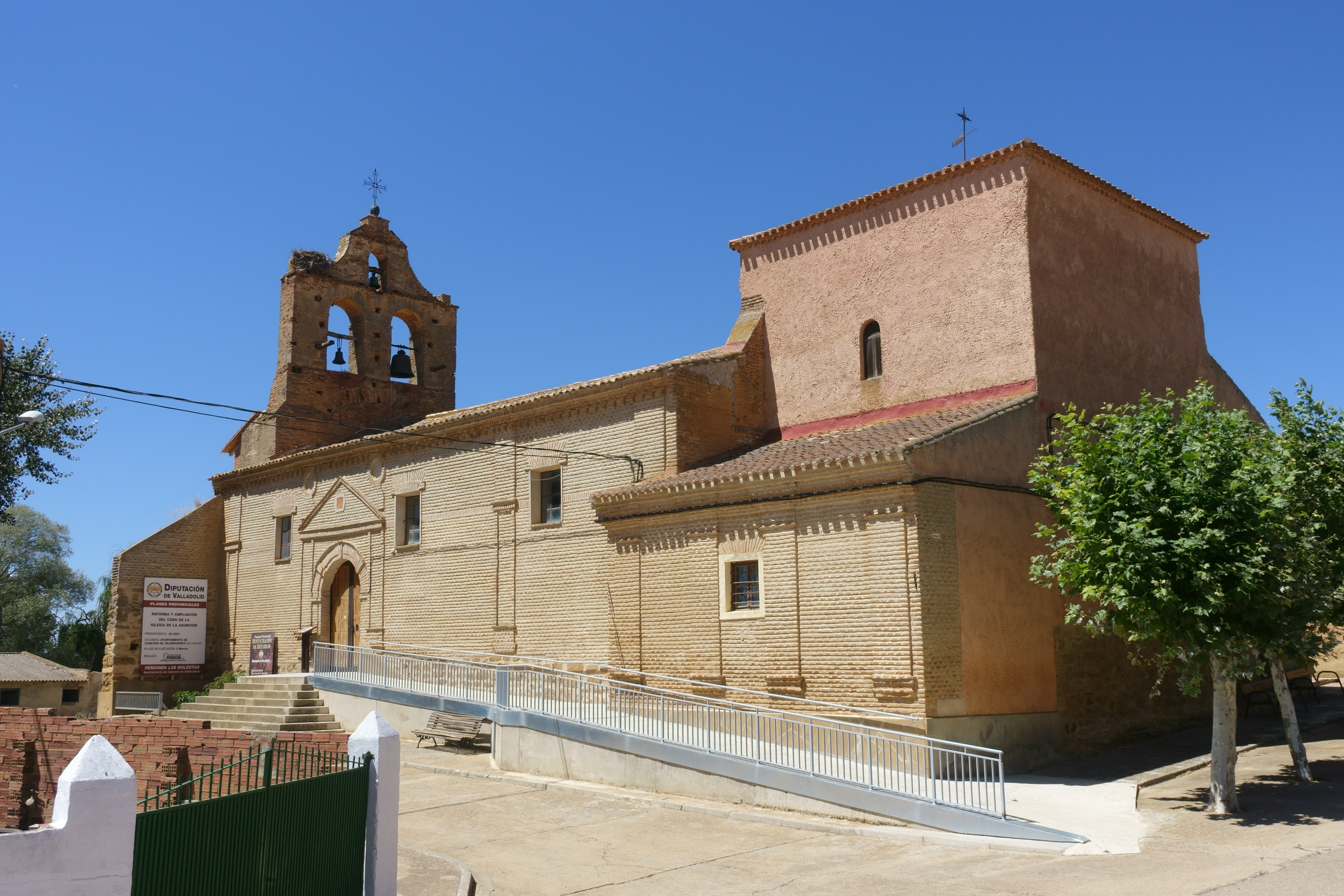 Iglesia de la Asunción de Nuestra Señora, Cabezón de Valderaduey (Valladolid, España).